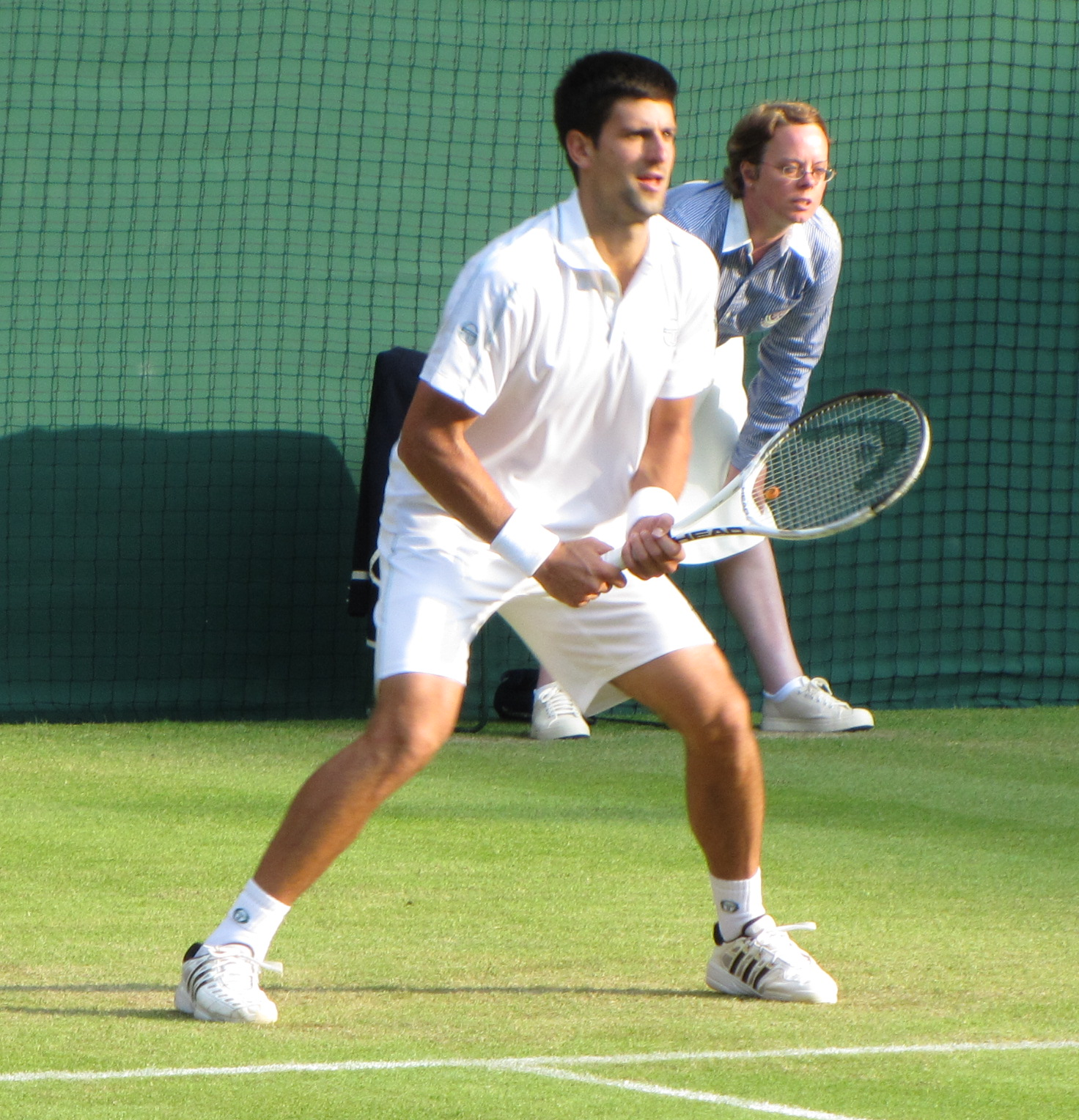 Novak Đoković, 2010 Wimbledon Championships